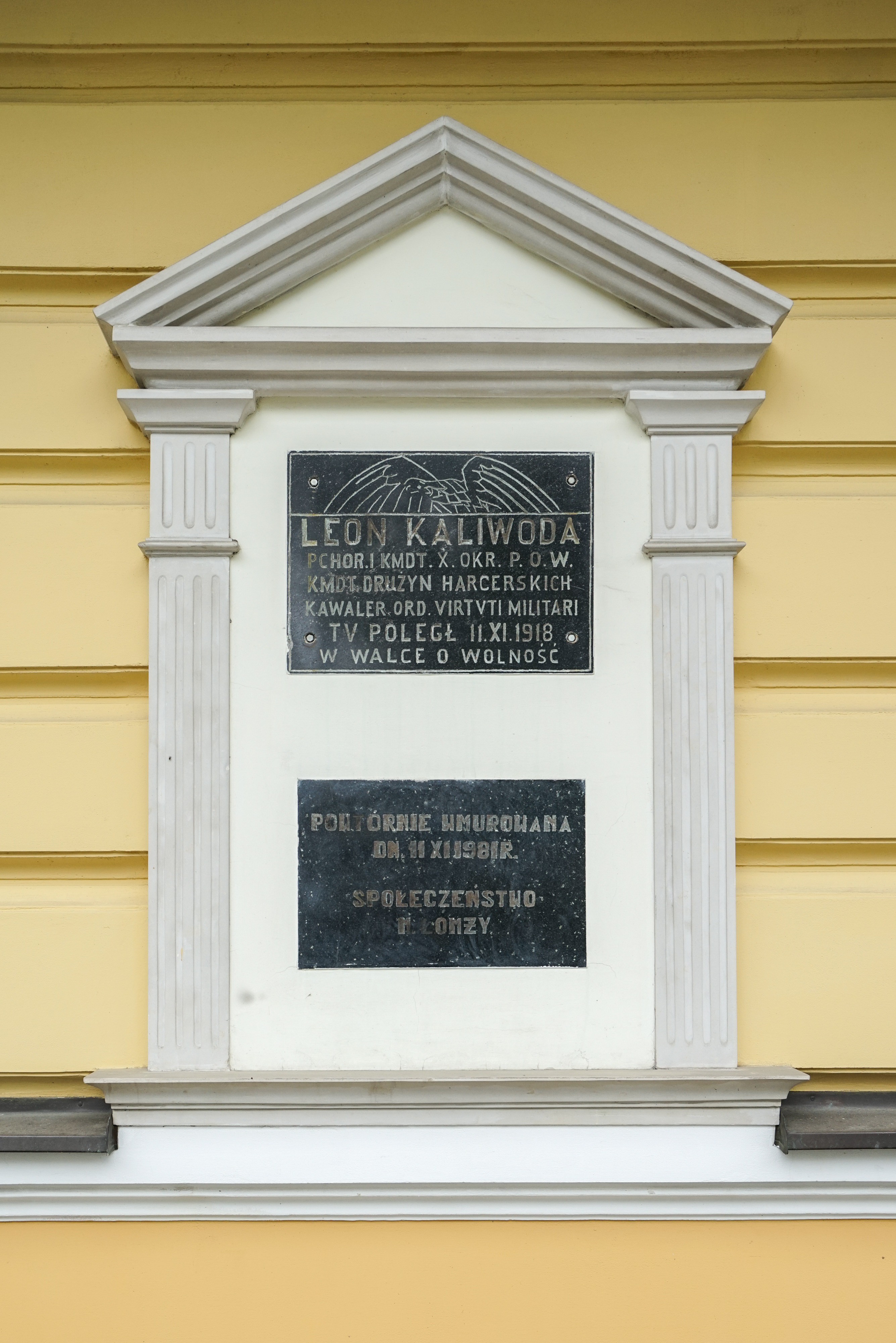 Tablica pamiątkowa poświęcona Leonowi Kaliwodzie na ścianie kamienicy rodziny Śledziewskich w Łomży)